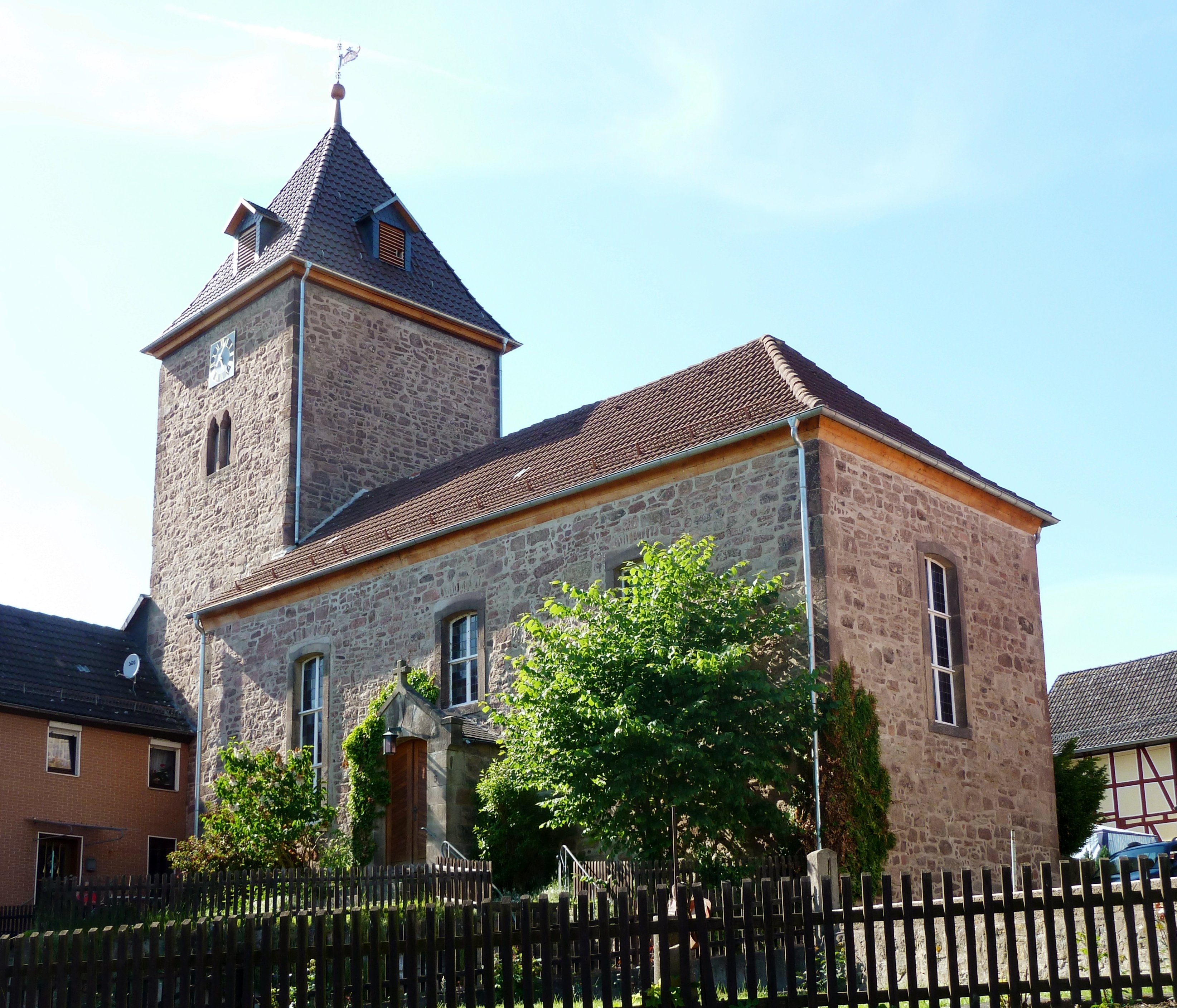 Evangelische Kirche in Blickershausen, Stadt Witzenhausen, Hessen. Turm gotisch, Schiff 1779 erbaut